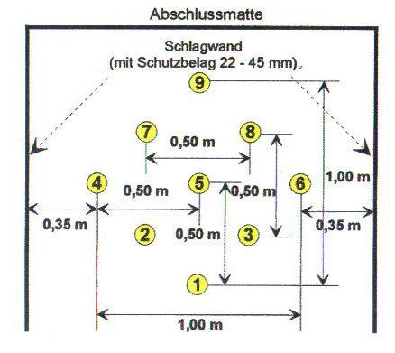 Vierpass, Kegelstand